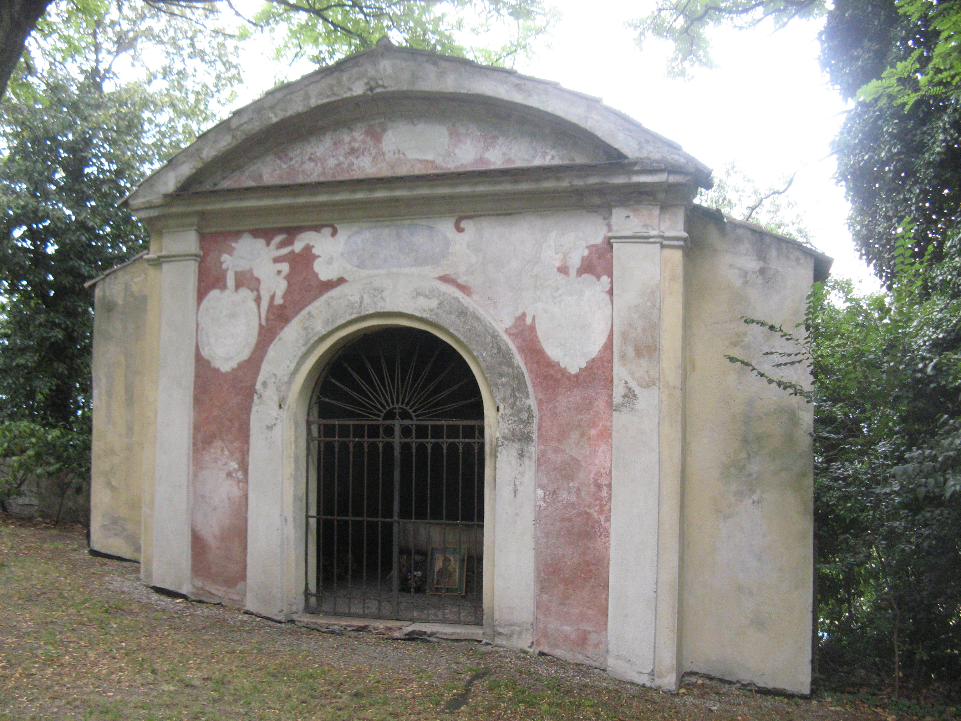 Kapelle mit Christus als Brunnenfigur, Heiliggrabkirche, Bozen